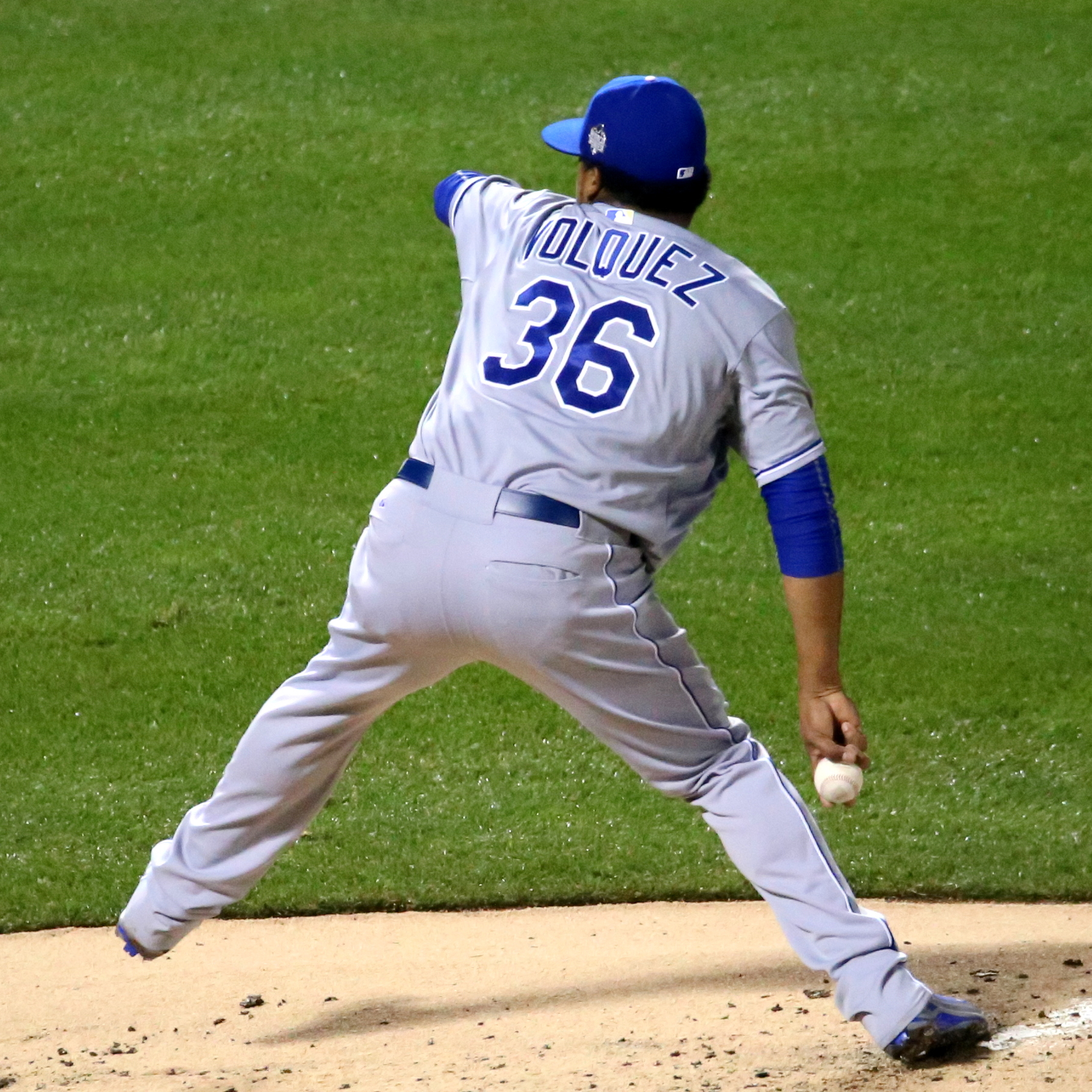 Edinson Volquez